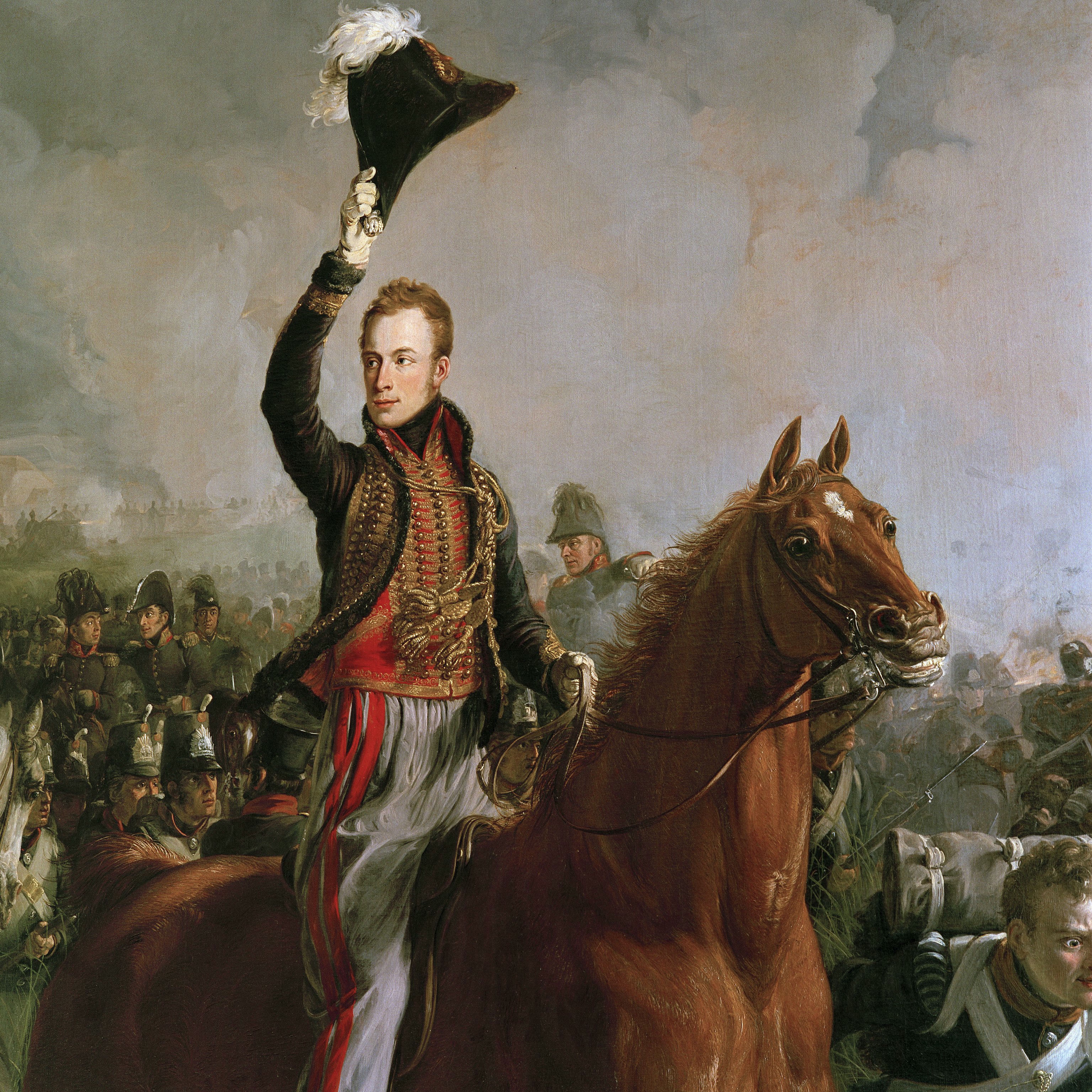 Paleis Soestdijk: Interieur, detail van het schilderij uit 1824 van J.W.Pieneman in de Waterloozaal, genaamd: "De Prins van Oranje tijdens de slag bij Quatre Bras", gelegen aan de voorzijde van het corps de logis